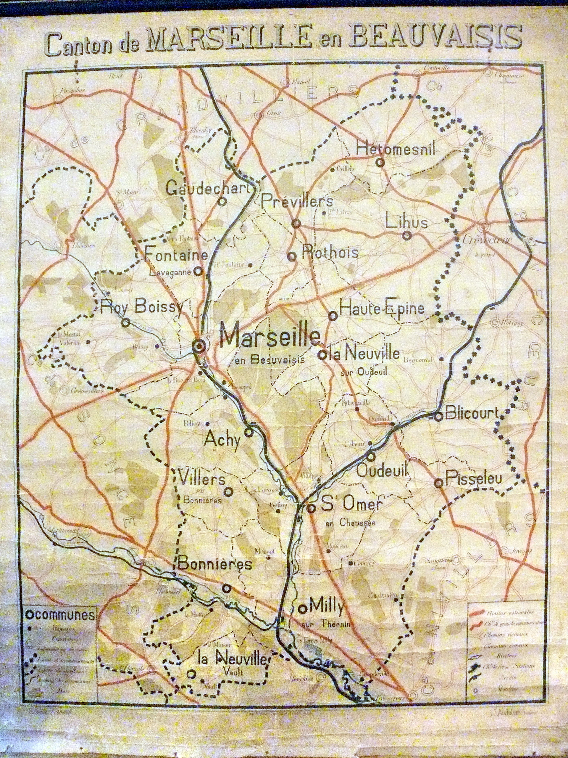 Ancienne carte d'école (début du XXe siècle) Canton de Marseille-en-Beauvaisis exposée à l'écomusée d'Hétomesnil